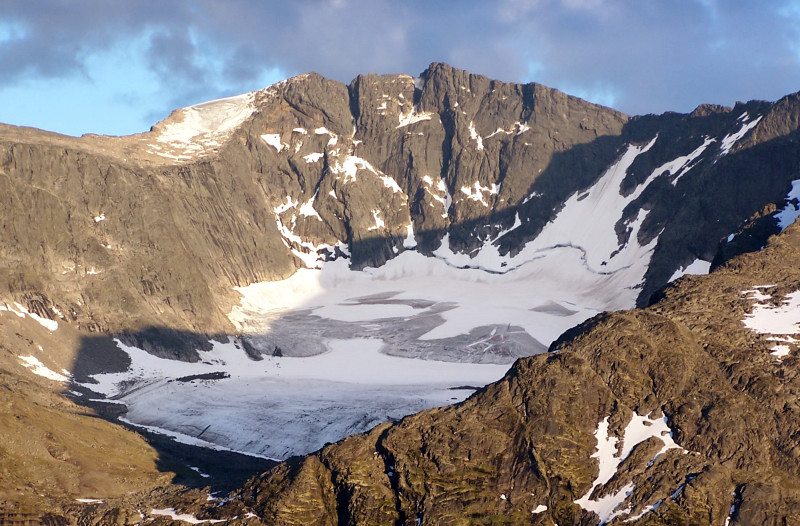 Tjønnholstinden sett fra nord. Foto: Tore Røraas/Marianne Gjørv